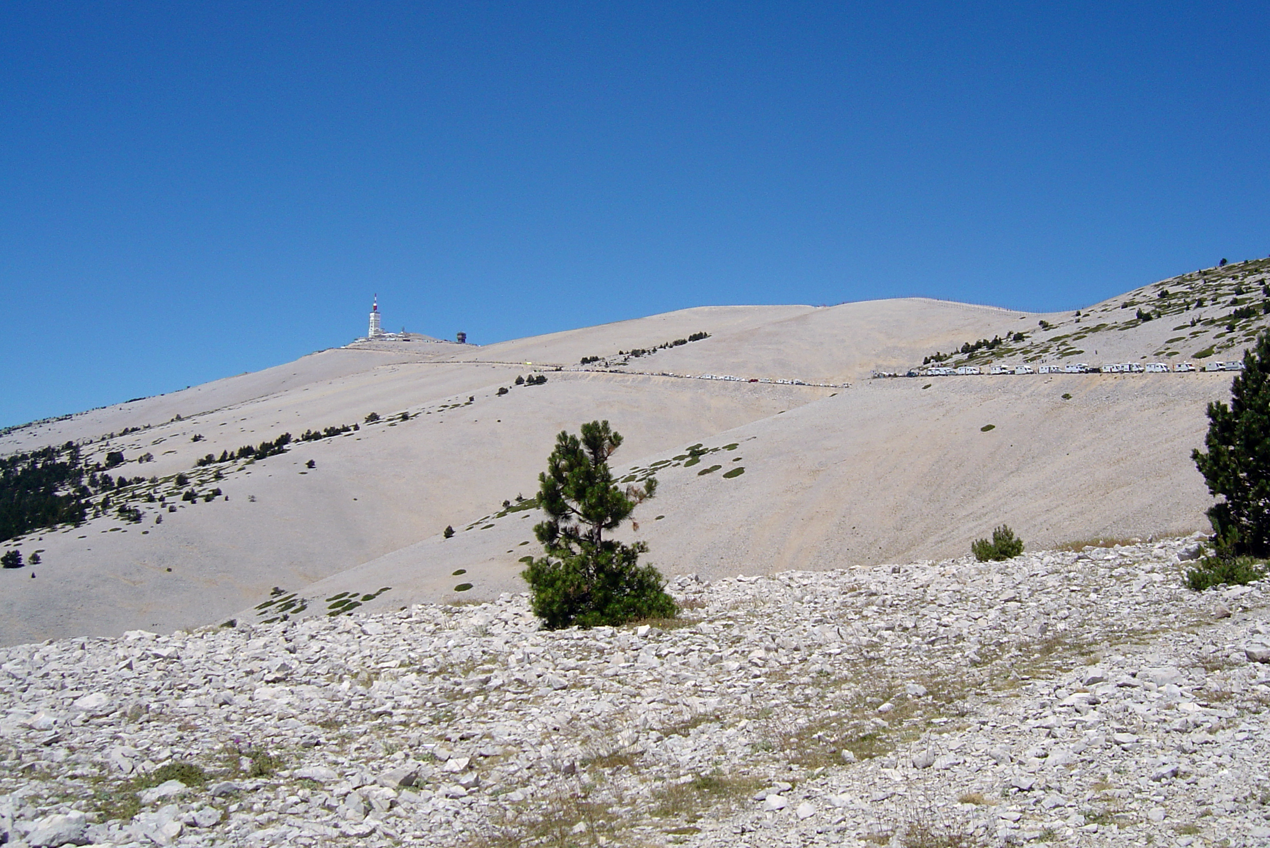 D 974 sud et est à environ 3 km du sommet du Ventoux lors de l'arrivée du Tour de France 2009